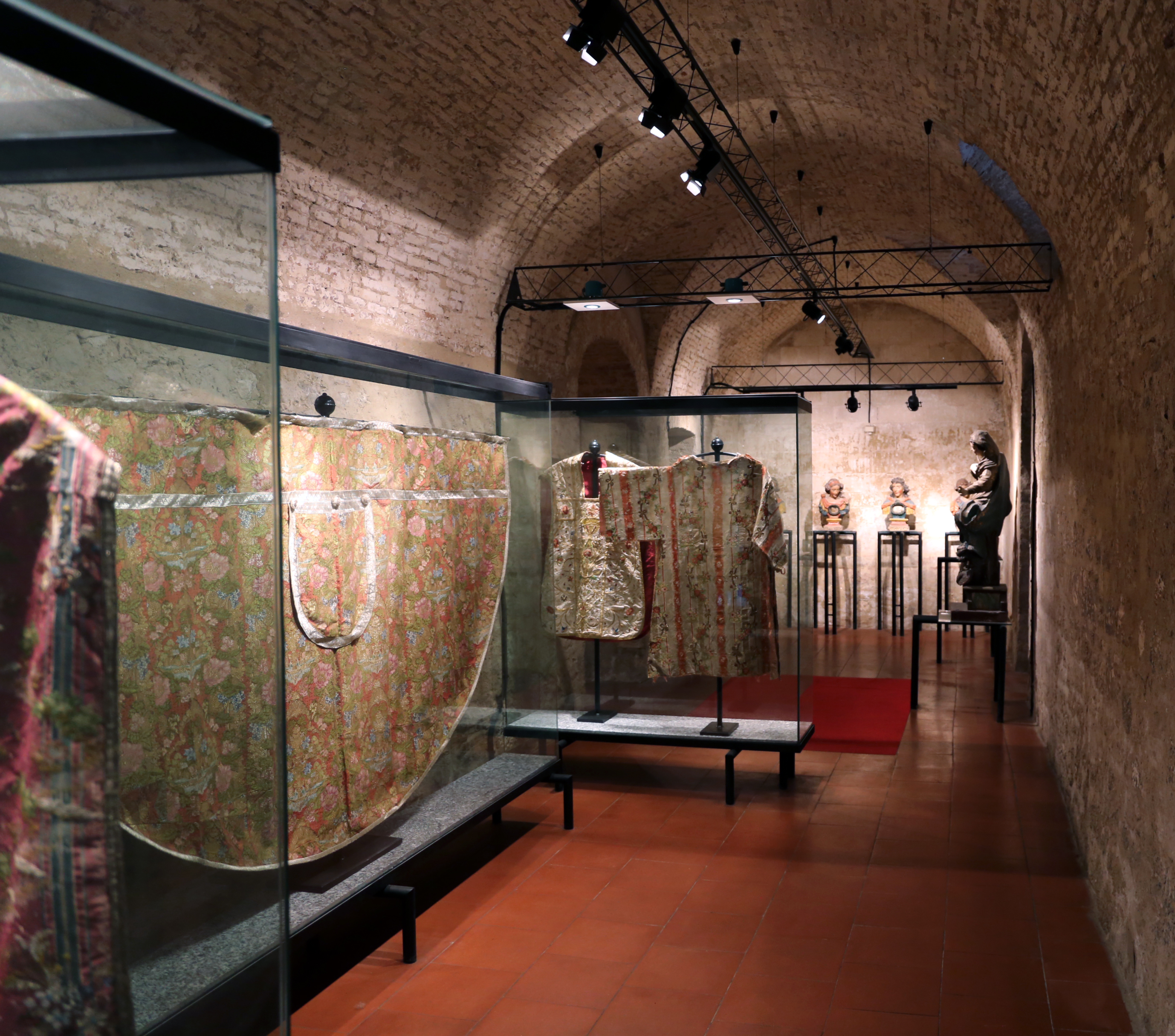 Piazza Santa Maria Maggiore This is a photo of a monument which is part of cultural heritage of Italy.